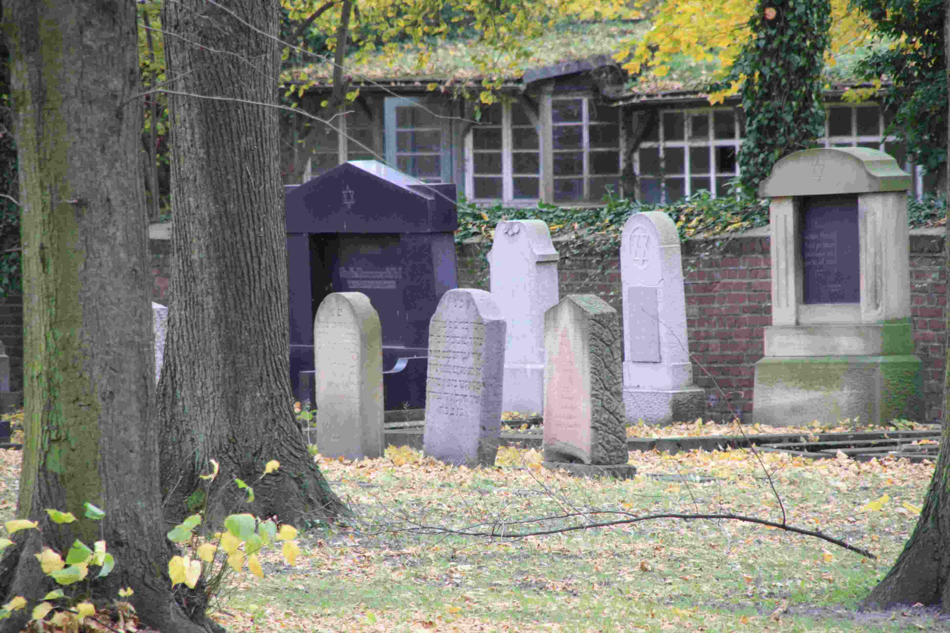 Jüdischer Friedhof Elsdorf 10